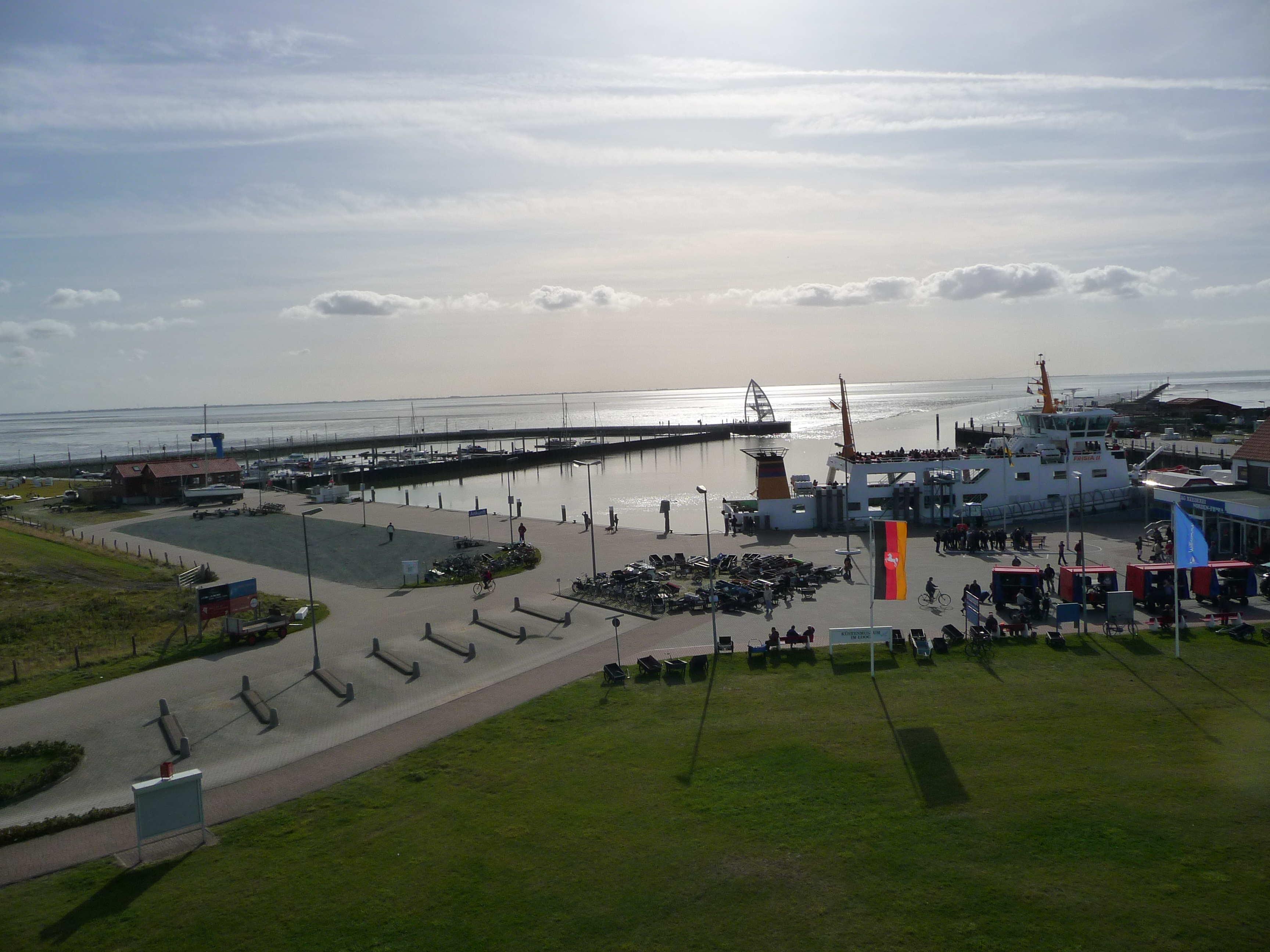 Blick vom Leuchtturm auf den Hafen mit Seebrücke und Seezeichen der ostfriesischen Nordseeinsel Juist (Niedersachsen, Deutschland)